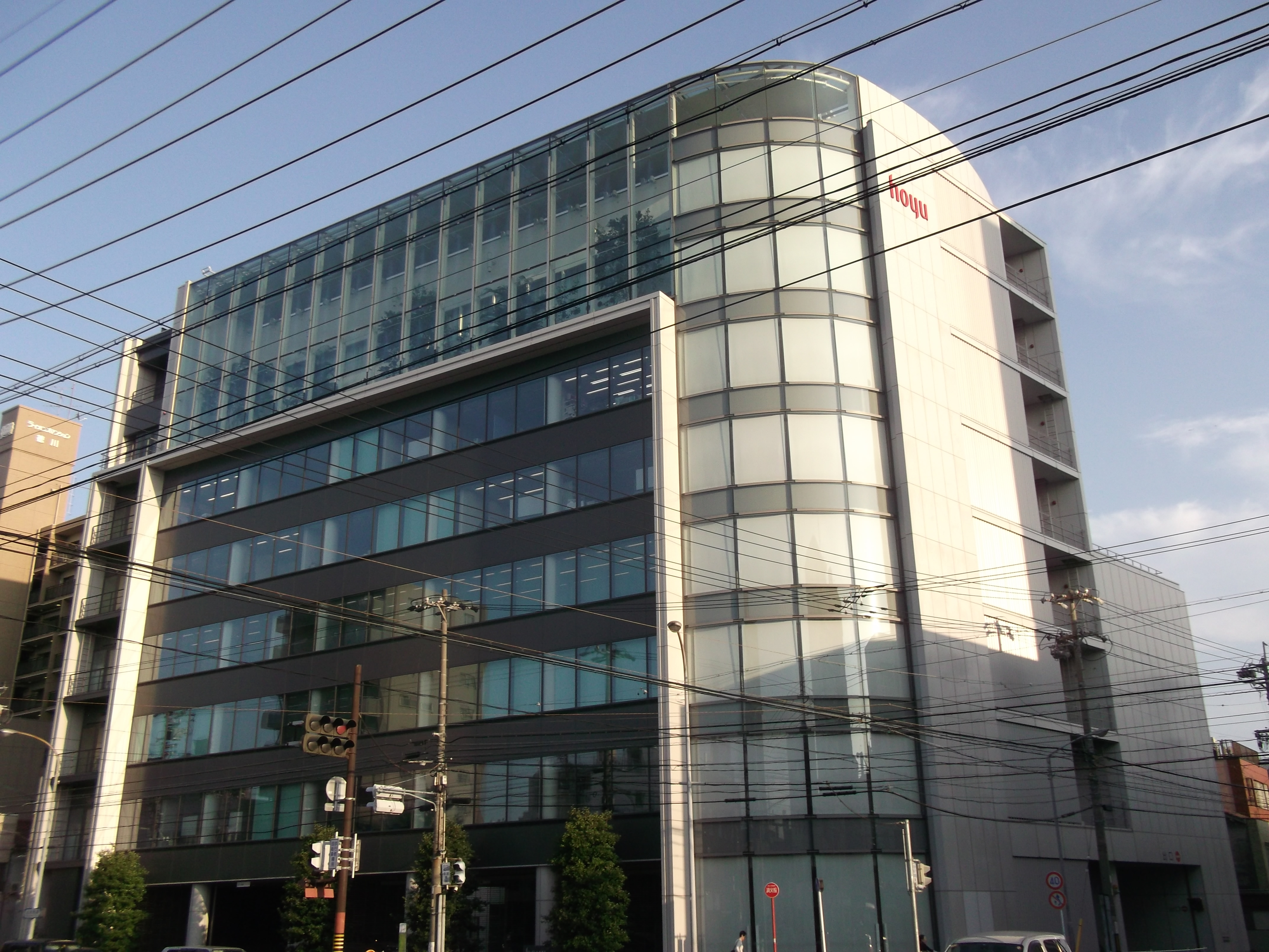 名古屋市東区徳川のホーユー本社を北側公道西側から撮影